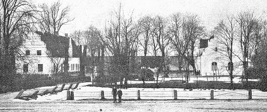 Damsbo er oprettet som hovedgård i 1552 af Jacob Mikkelsen Brockenhuus. Damsbo ligger i Jordløse Sogn, Sallinge Herred, Haarby Kommune. Hovedbygningen er opført i 1654-1657.